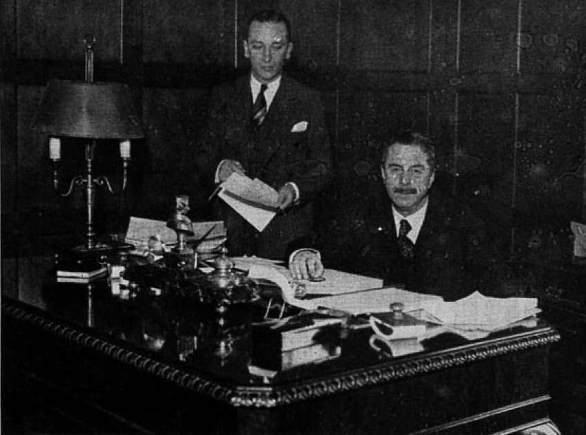 El Ministro de Relaciones exteriores, don Miguel Cruchaga Tocornal, trabajando en su despacho con su secretario, señor Alejandro Beltrand. Palacio de la Moneda en 1936